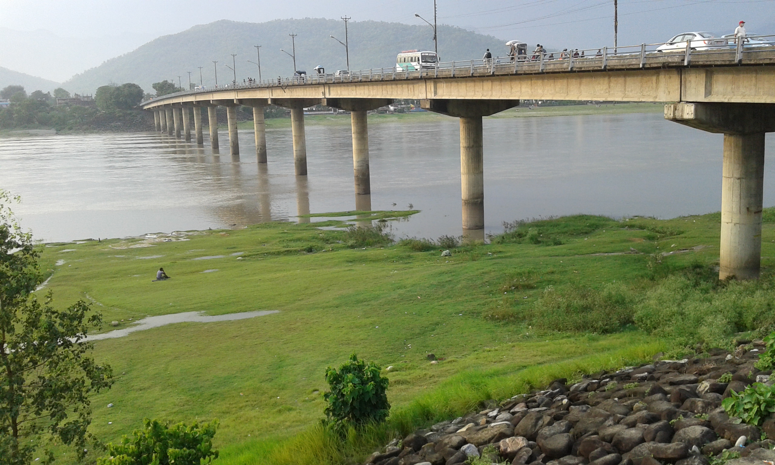 Narayanibrücke bei Bharatpur (Nepal)